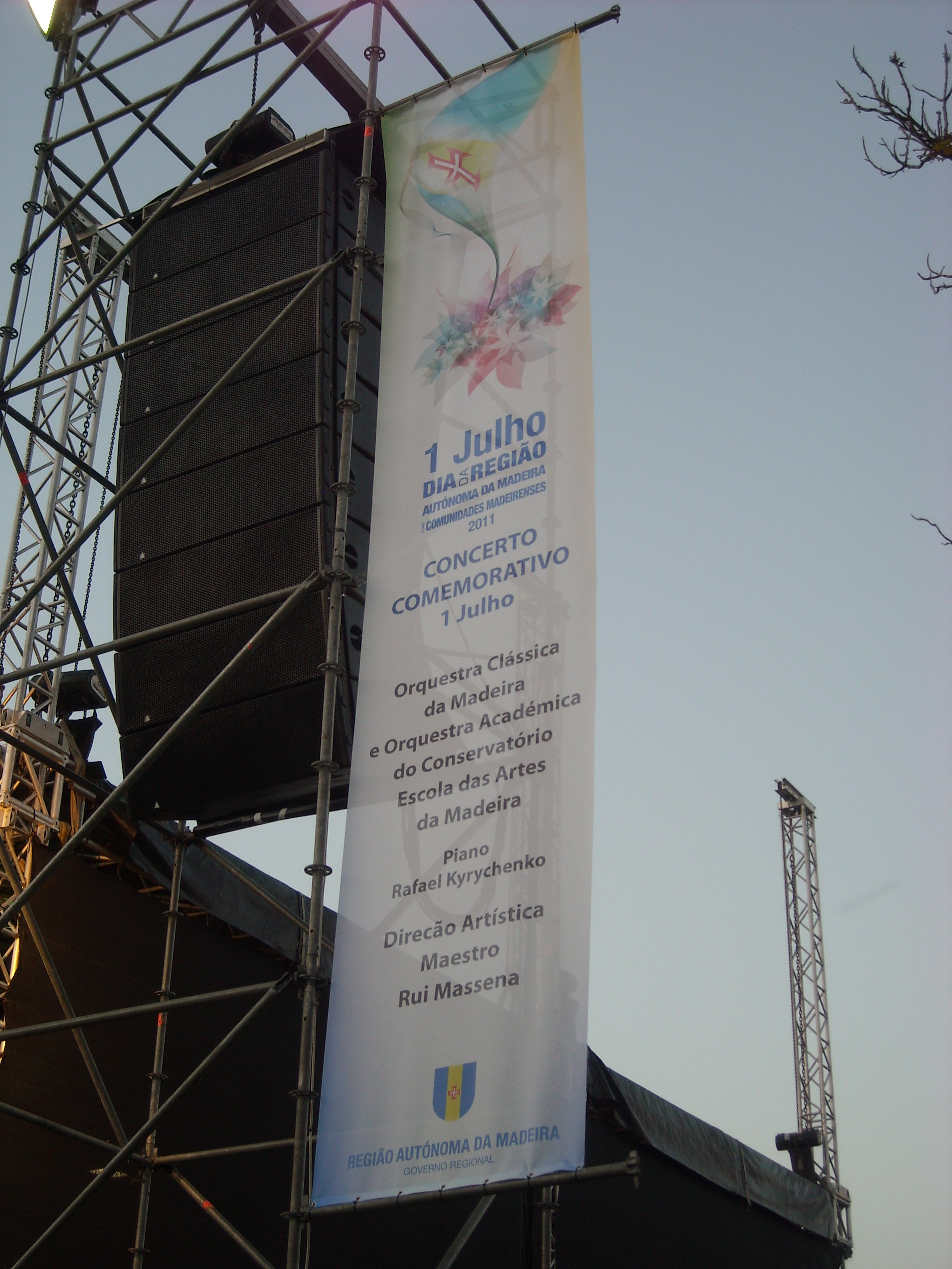 Aragonés: Concierto Día Nacional de Madeira